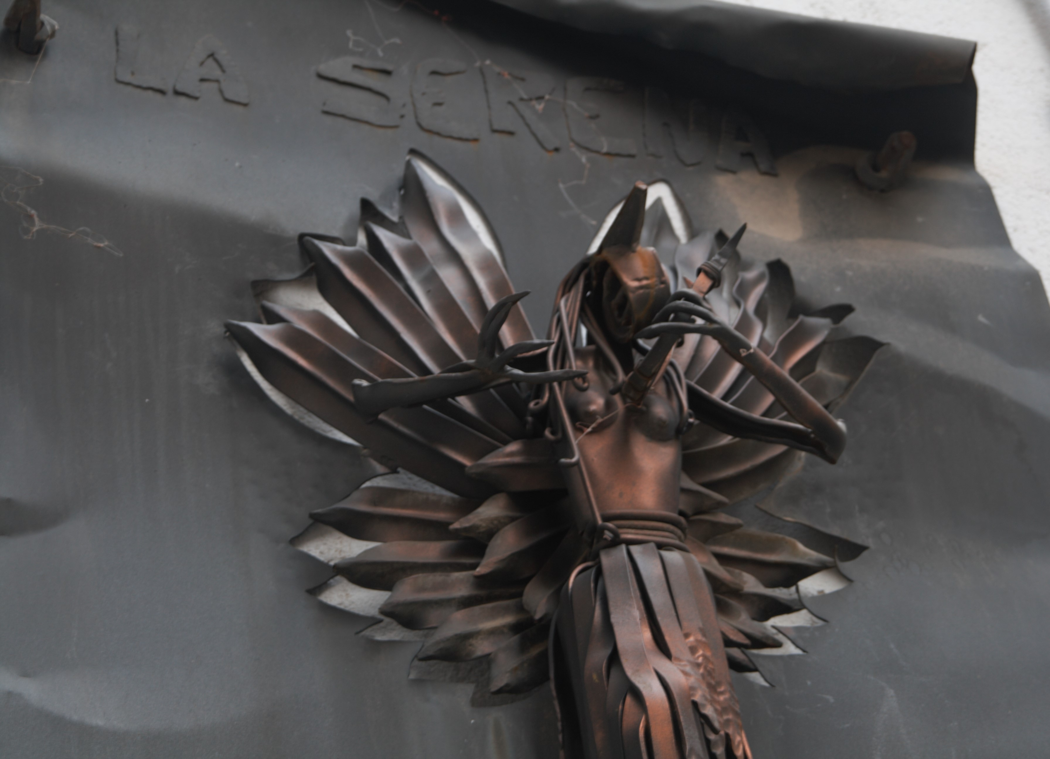 Escultura de la Serena ubicada al carrer Miravet de Gandesa. Fons IPCITE